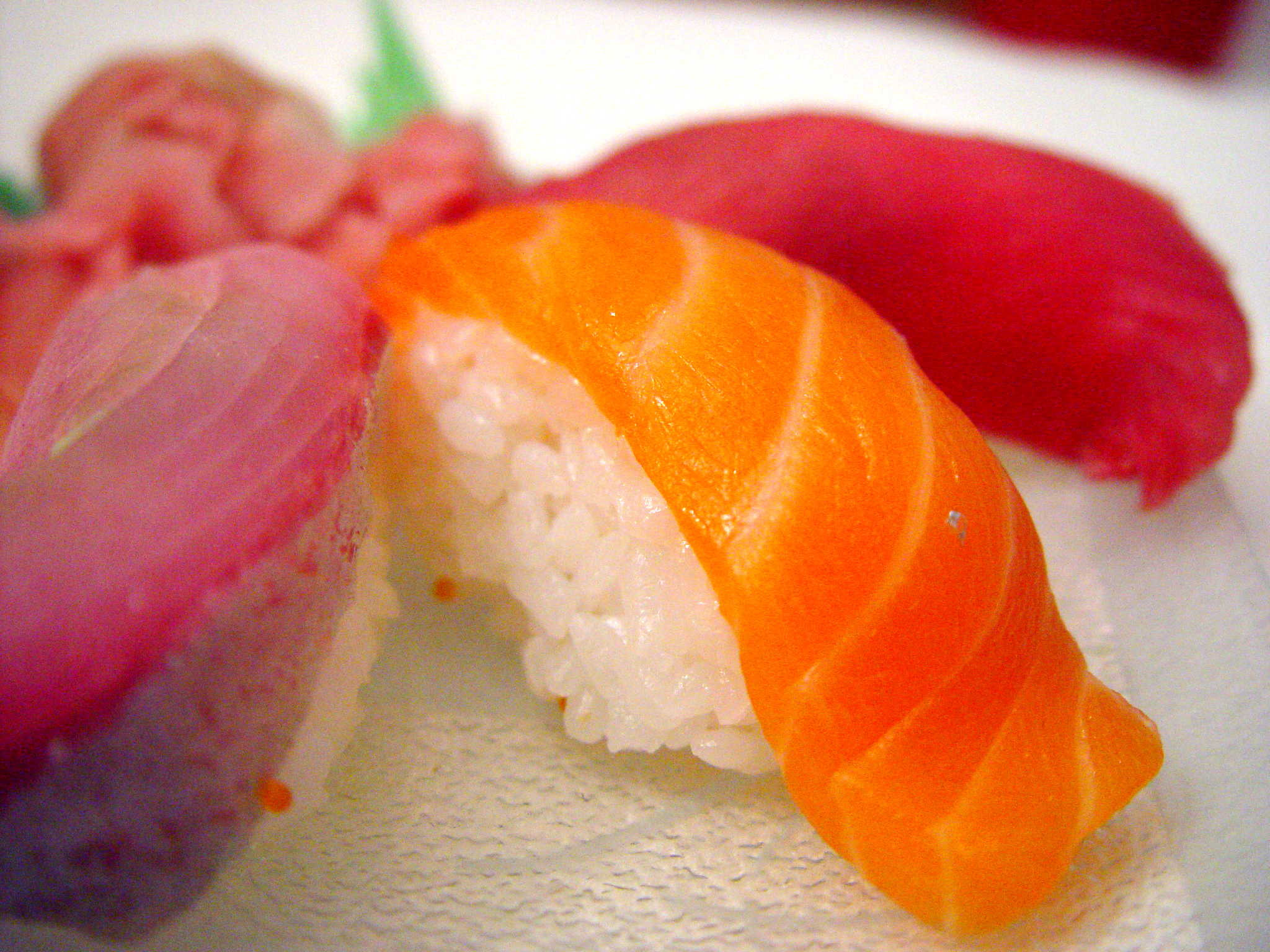 Nigiri de maguro i sake.salmon